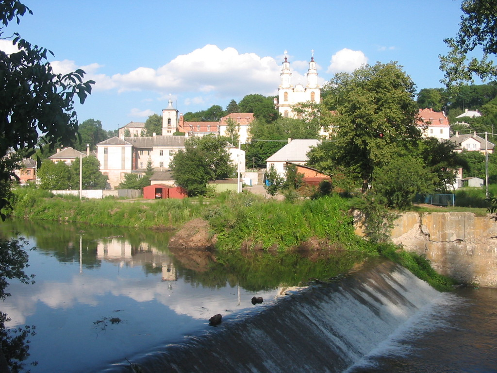 River Strypa in Buchach, western Ukraine